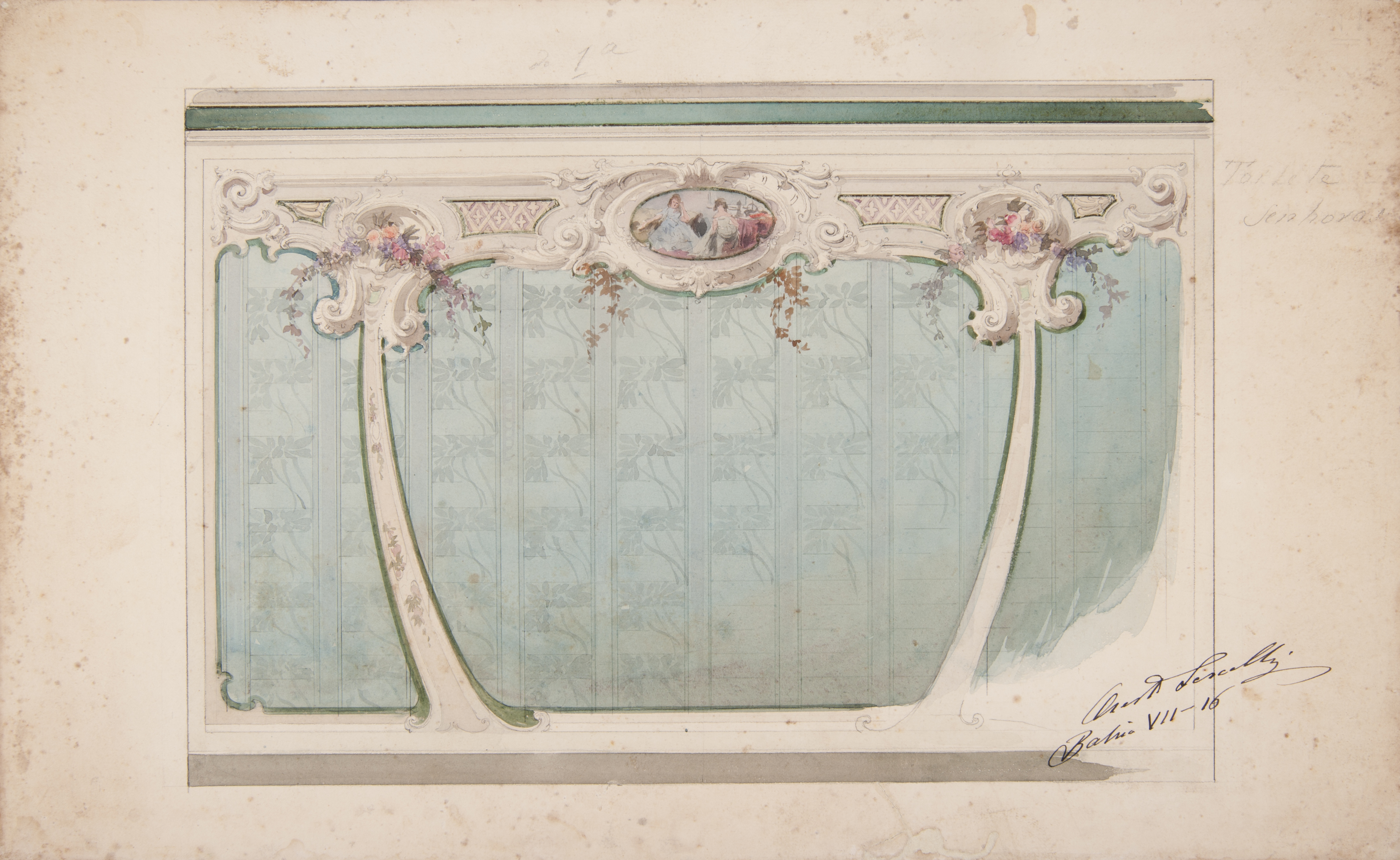 Obra que integra o acervo do Museu Paulista da USP.